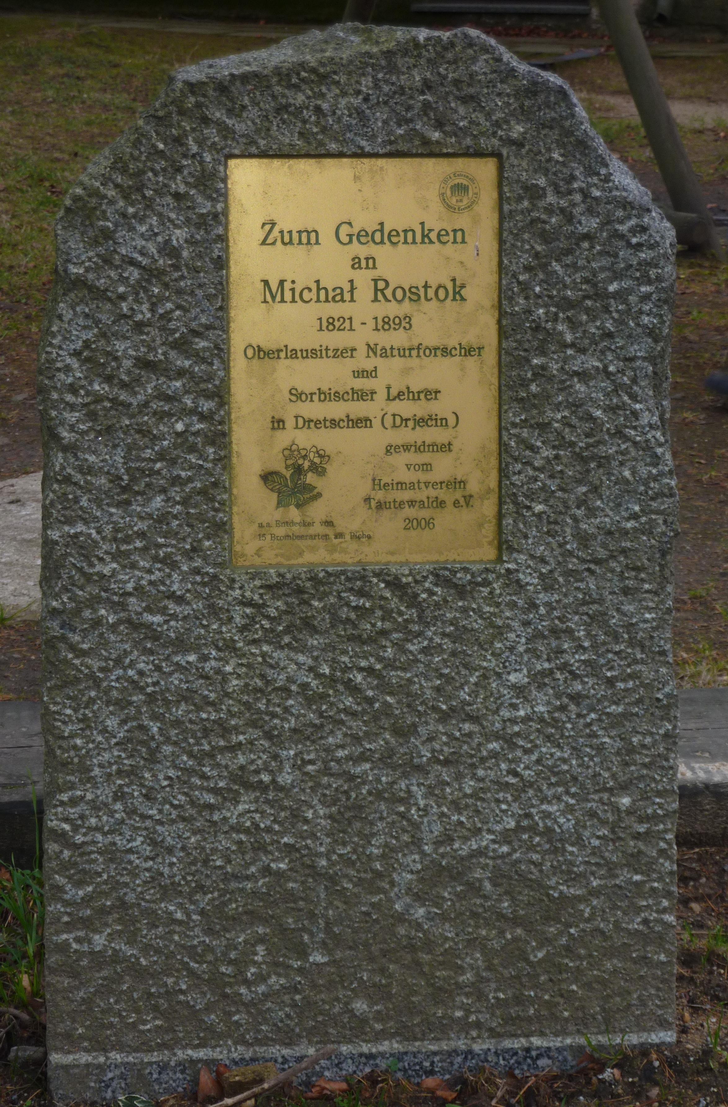 Tautewalde, Großer Picho. "Zum Gedenken an Michał Rostok 1821-1893 Oberlausitzer Naturforscher und Sorbischer Lehrer in Dretschen (Drječin) gewidmet vom Heimatverein Tautewalde e.V. 2006"